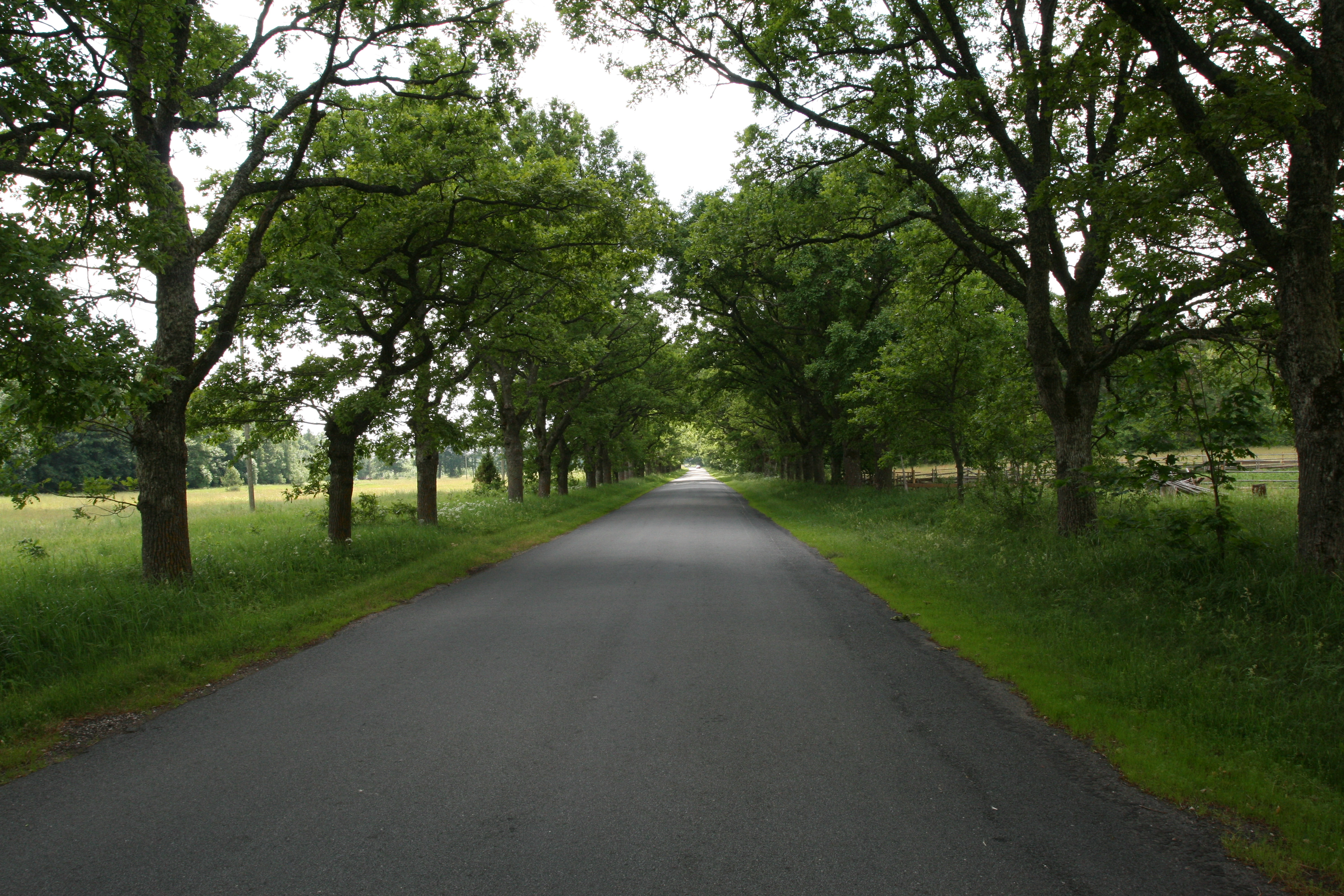 Pootsi mõisa allee